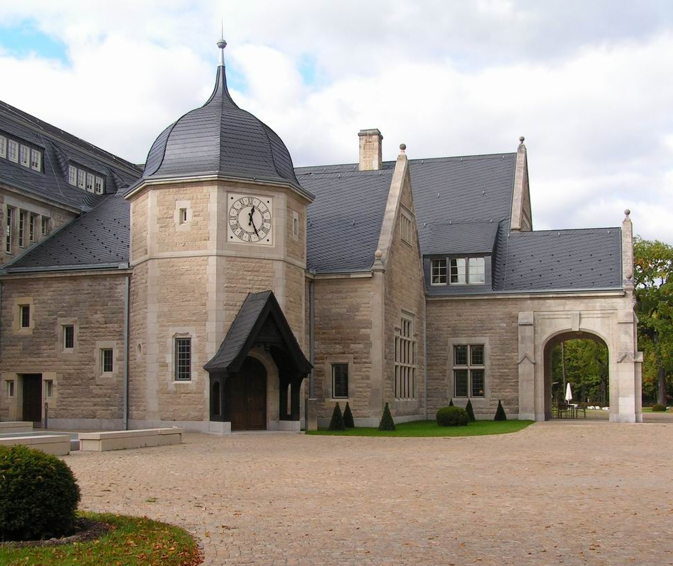 Potsdam, Kaiserbahnhof, Empfangsgebäude